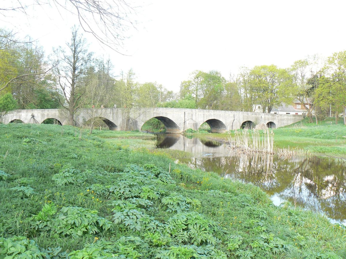 Vanamõisa mõisa sild